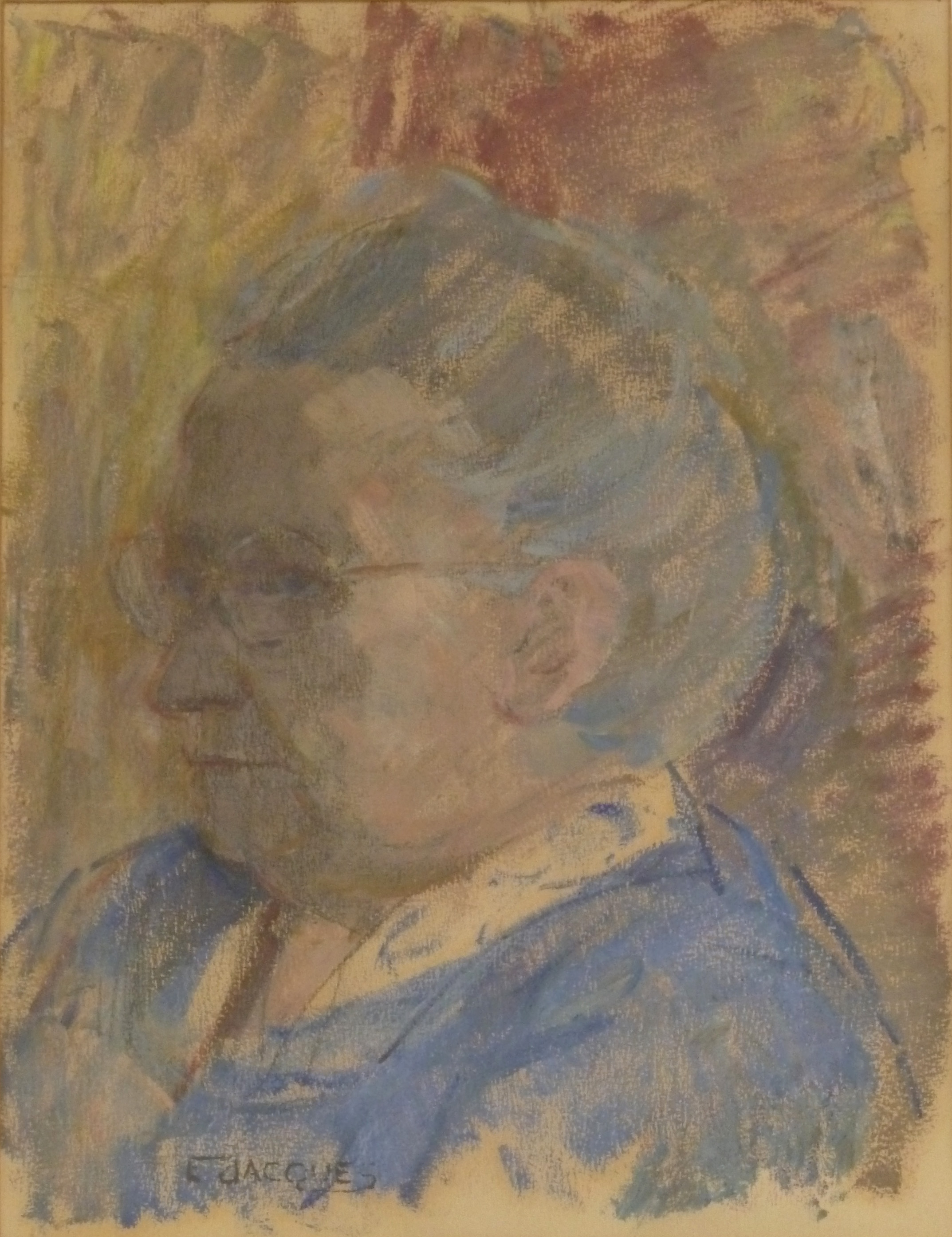 "Profiel van dam", gemengde techniek (45 x 32 cm) door de Belgisch-Amerikaanse kunstschilder Emiel Jacques (1874-1937); privébezit